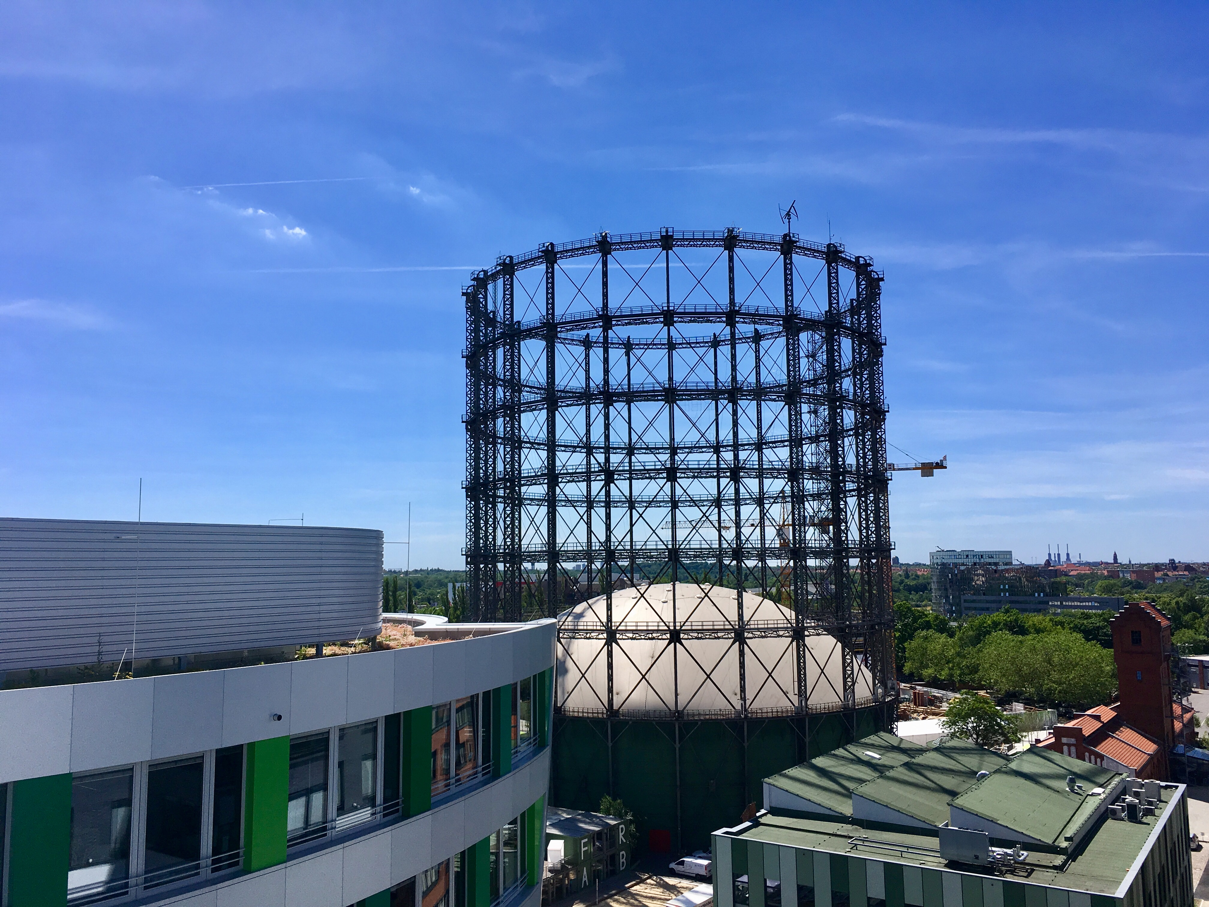 Der EUREF-Campus in Schöneberg